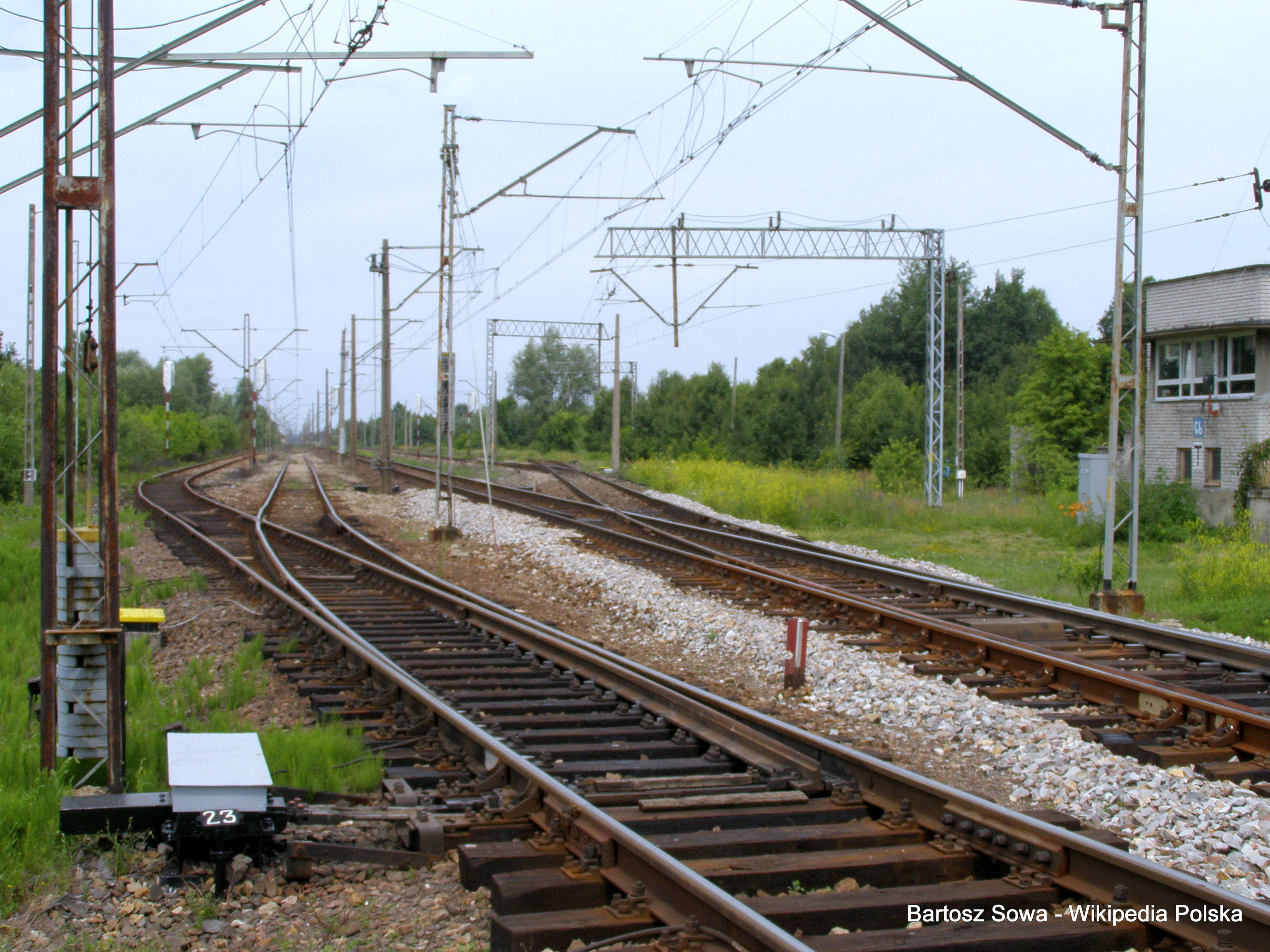 Stacja kolejowa Grzebowilk. 5 torów, 0 peronów, 0 ramp, duży ruch pociągów pospiesznych i międzynarodowych (Niemcy - Polska - Ukraina).